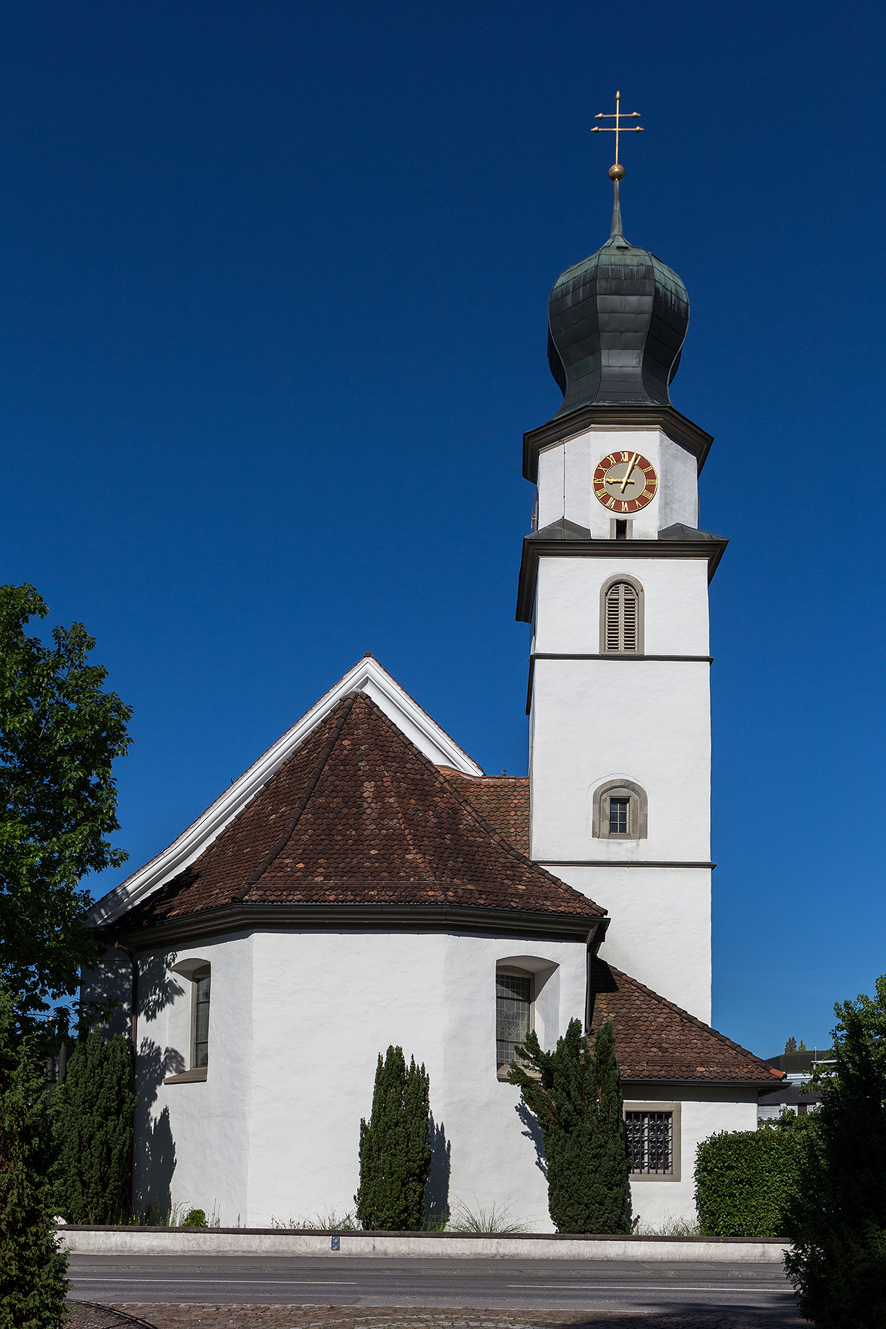 Pfarrkirche St. Matthias in Steinhausen (ZG)